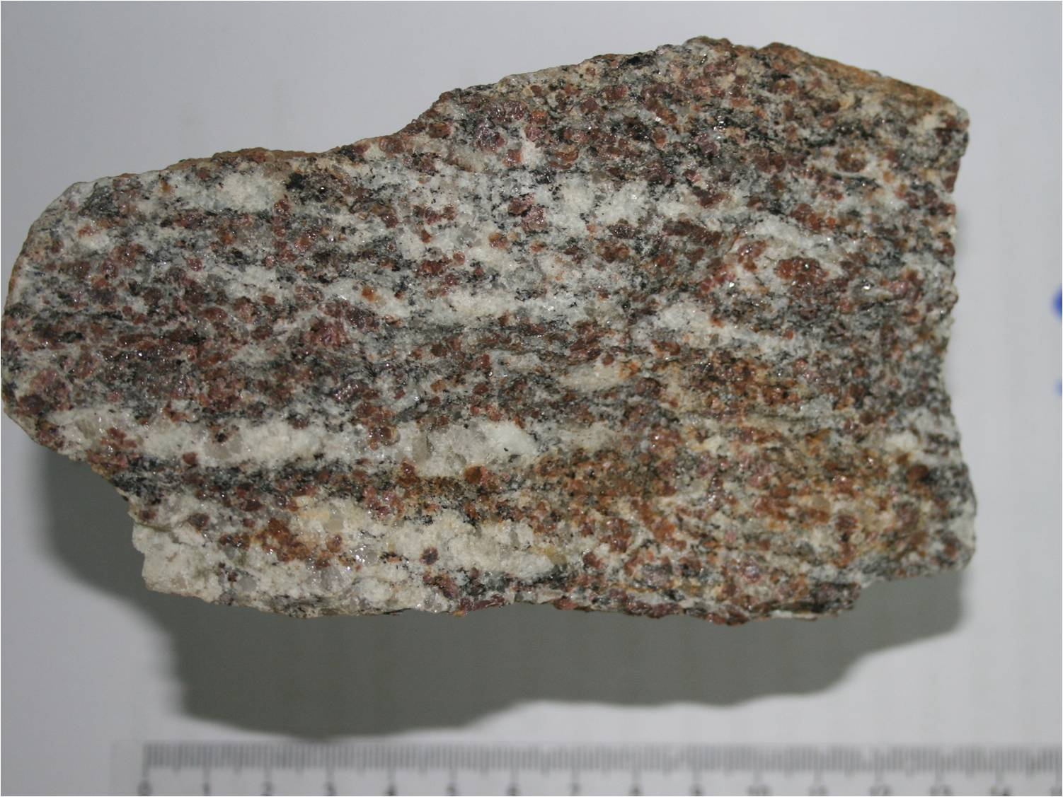 การ์เนตไนส์ หินไนส์ที่มีองค์ประกอบส่วนใหญ่เป็นแร่การ์เน็ต